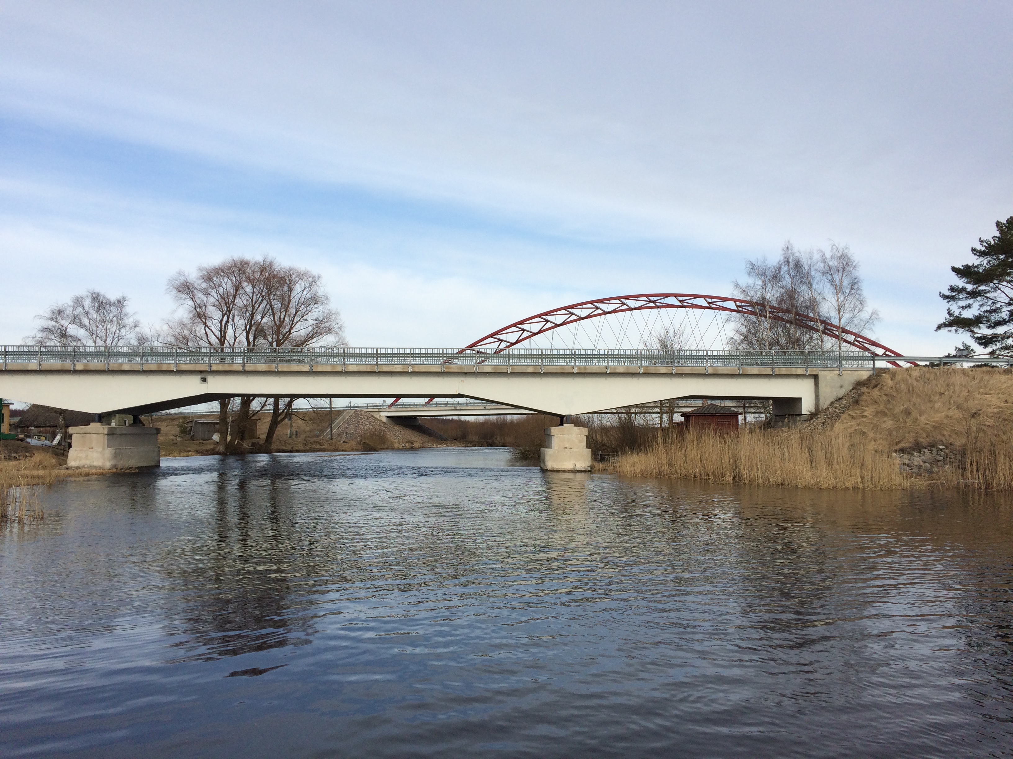 Jõesuu sild